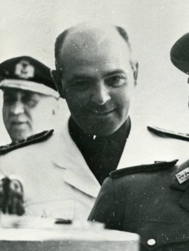 Personajes: Franco Bahamonde, Francisco El General Franco acompañado de otras autoridades militares asistiendo a las explicaciones sobre el cañon Vickers